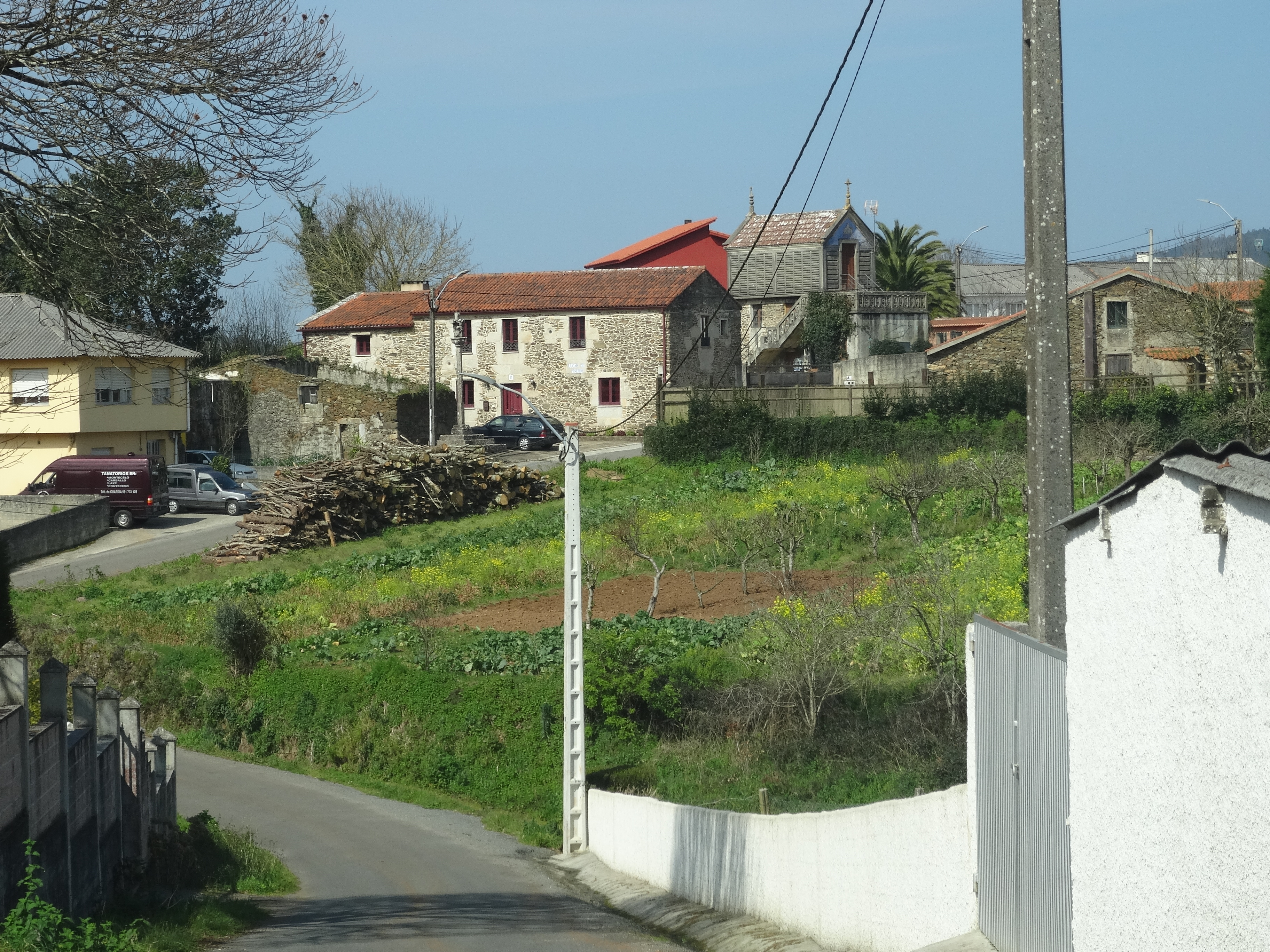 Lugar do Piñeiro, parroquia de Goiáns, Carballo.